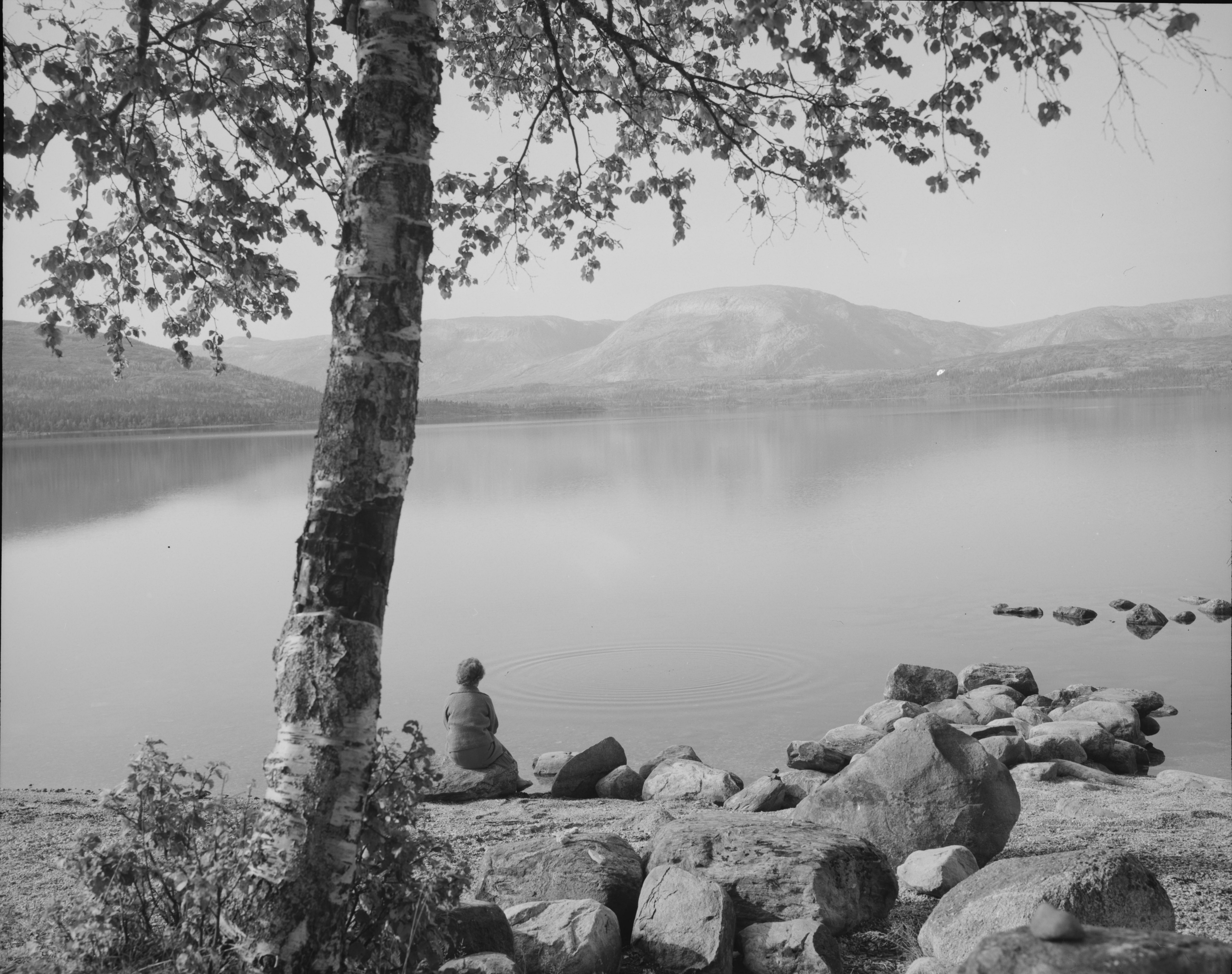 Bildet er hentet fra Nasjonalbibliotekets bildesamling. Anmerkninger til bildet var: Fotograf: LS